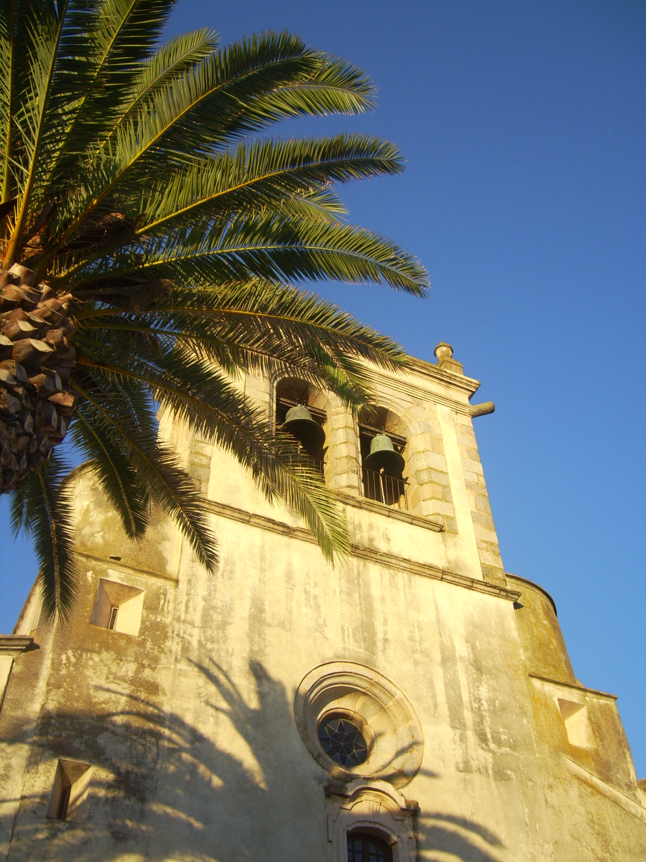 Santa Catalina Fregenal